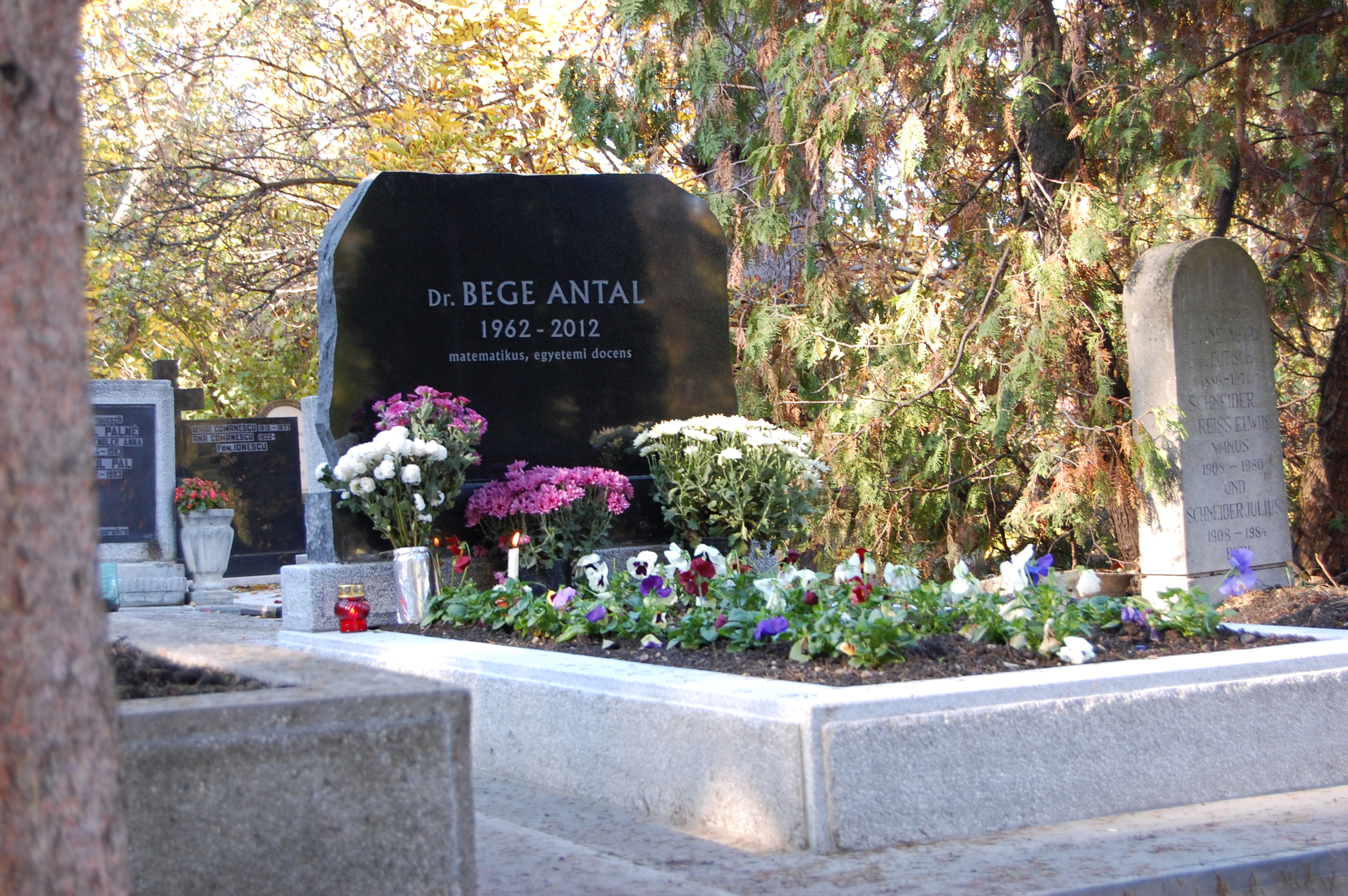 Bege Antal matematikus sírja